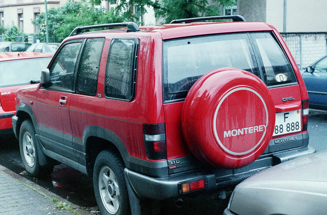 Opel Monterey RS 3.1 Turbodiesel in Frankfurt am Main (Isuzu Trooper, 2nd generation)